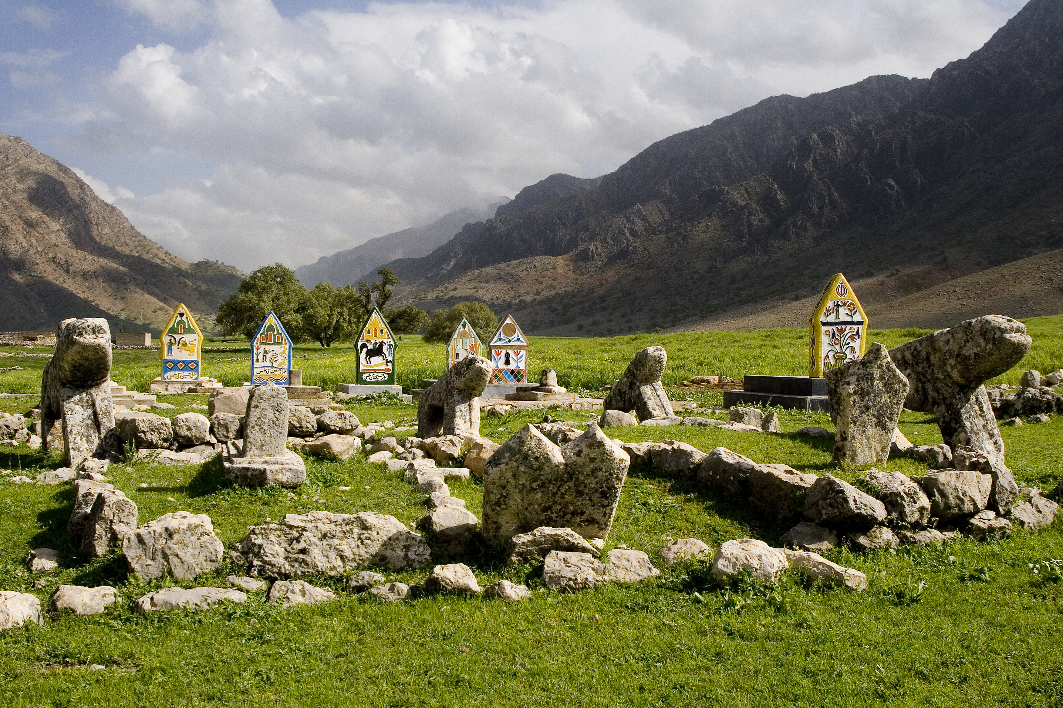 گورستان قدیمی